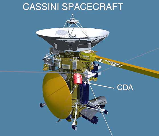 CDA an Cassini